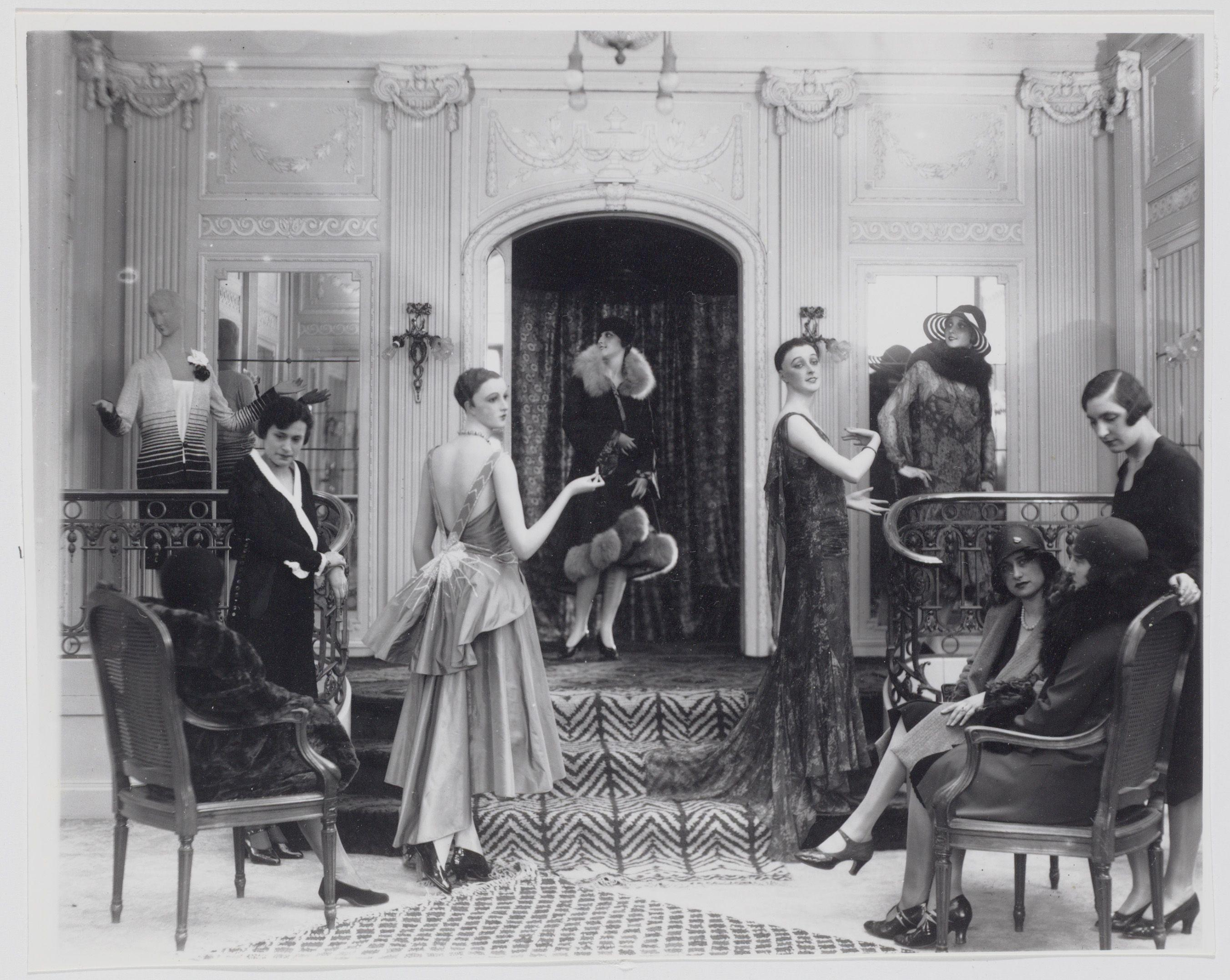 Beschrijving Leidseplein 29 Hirsch & Cie, afdeling damesmode. Documenttype foto Vervaardiger Merkelbach, Atelier J. Collectie Collectie Atelier J. Merkelbach Geografische naam Leidseplein Inventarissen Afbeeldingsbestand B00000002682 Generated with Dememorixer